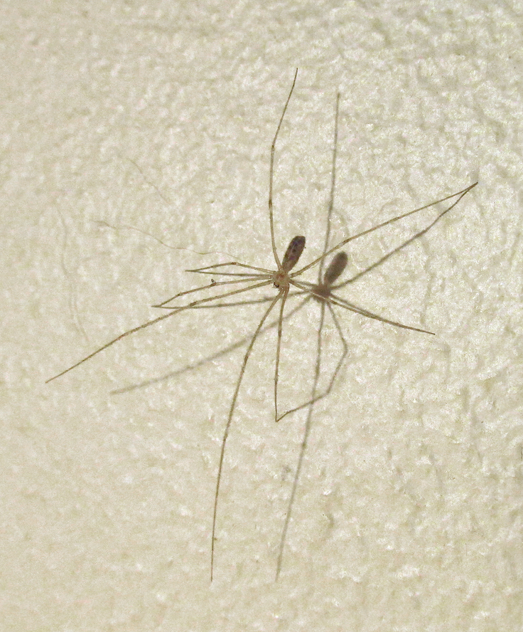 Mindre dallerspindel (Psilochorus simoni) i Ystad 2016.